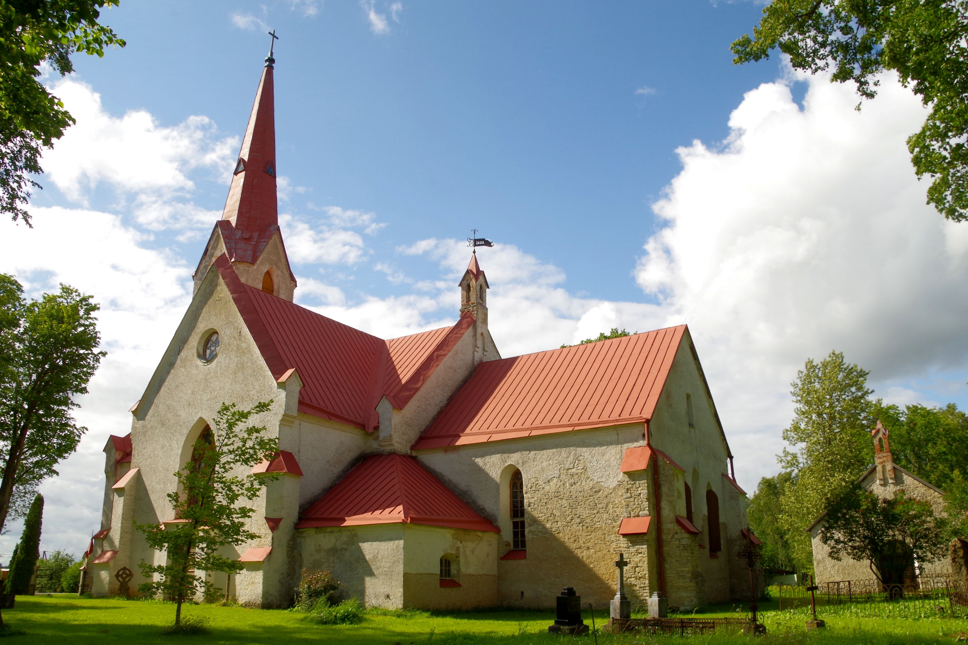 Juuru kirik